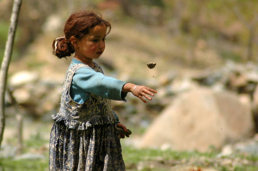 Ourmer, Haut-Atlas marocain. Fillette berbère éloignant son troupeau de vaches et de moutons en lançant des pierres. Thierry Milherou